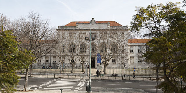 Entrada principal da Escola Secundária de Camões